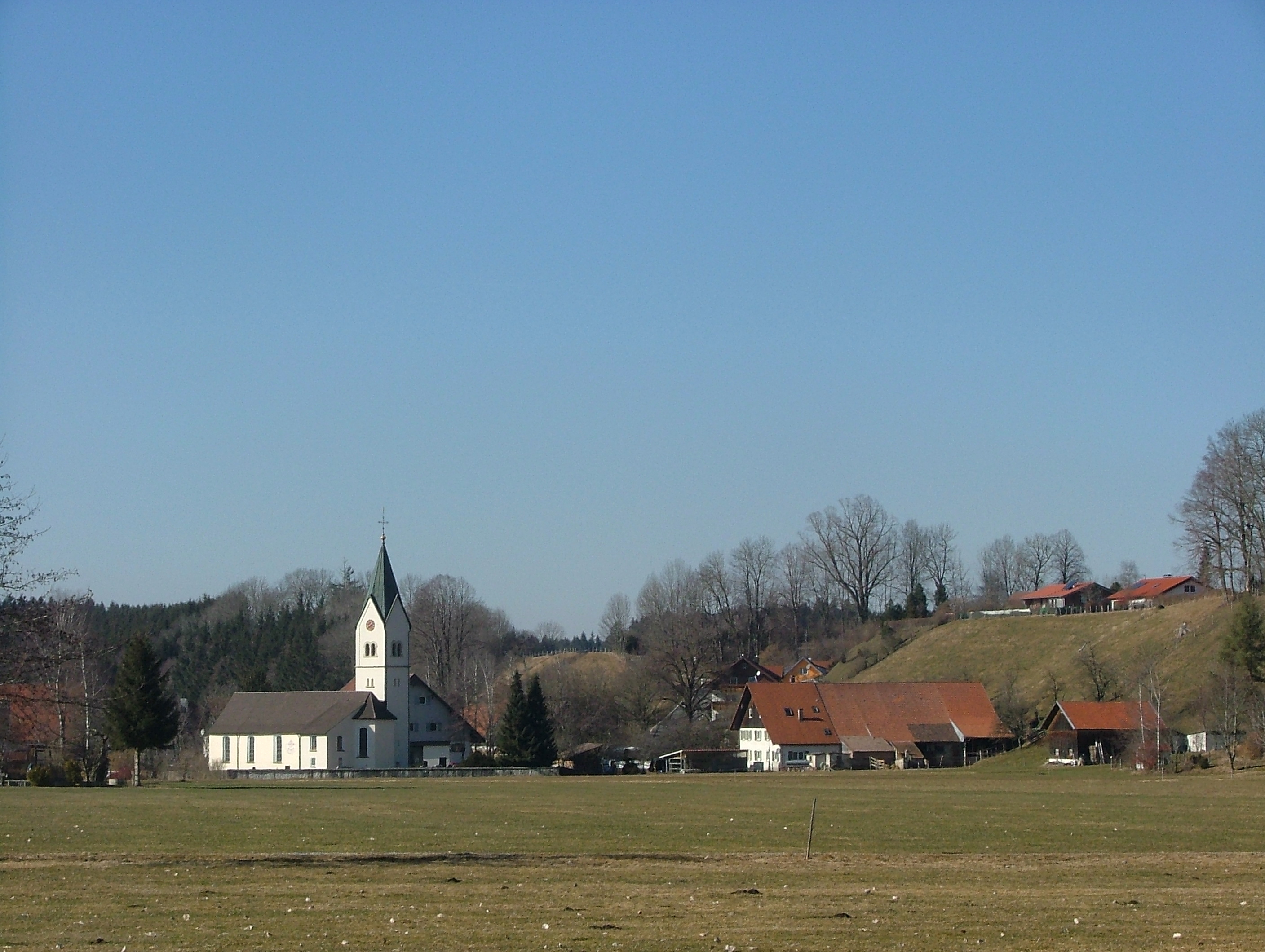 Hinznang